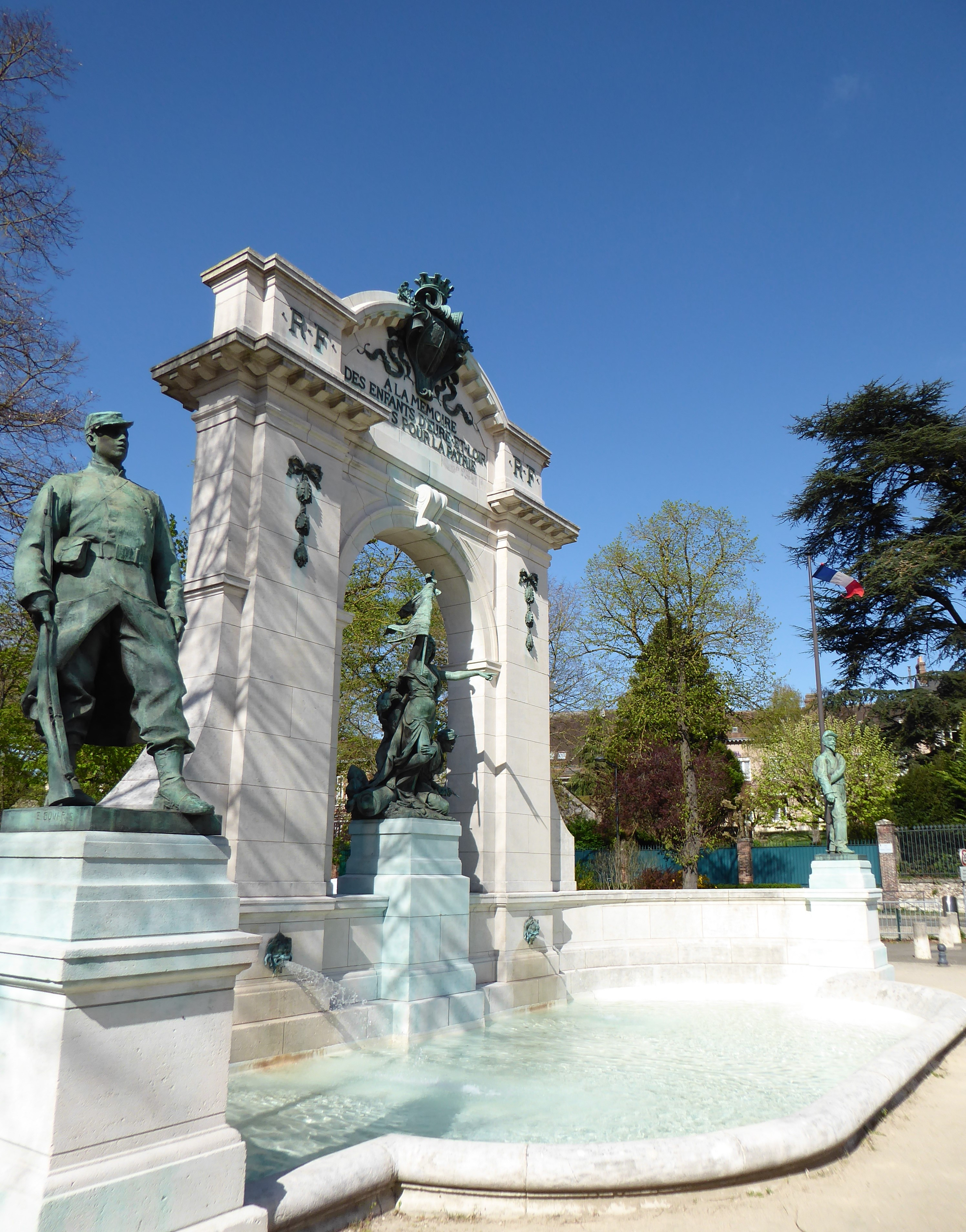 Monument aux morts de la guerre de 1870-1871, Chartres, Eure-et-Loir (France).